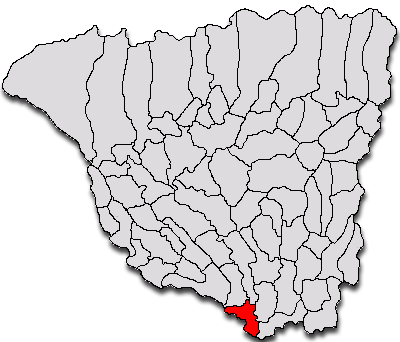 Categorie:Hărţi ale judeţului Gorj